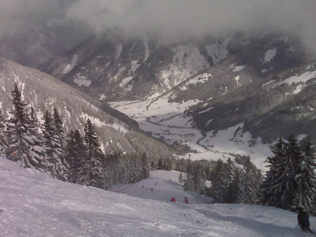 Abfahrt "Die Sonnige" auf der Riesneralm, Donnersbachwald, Steiermark, Oesterreich